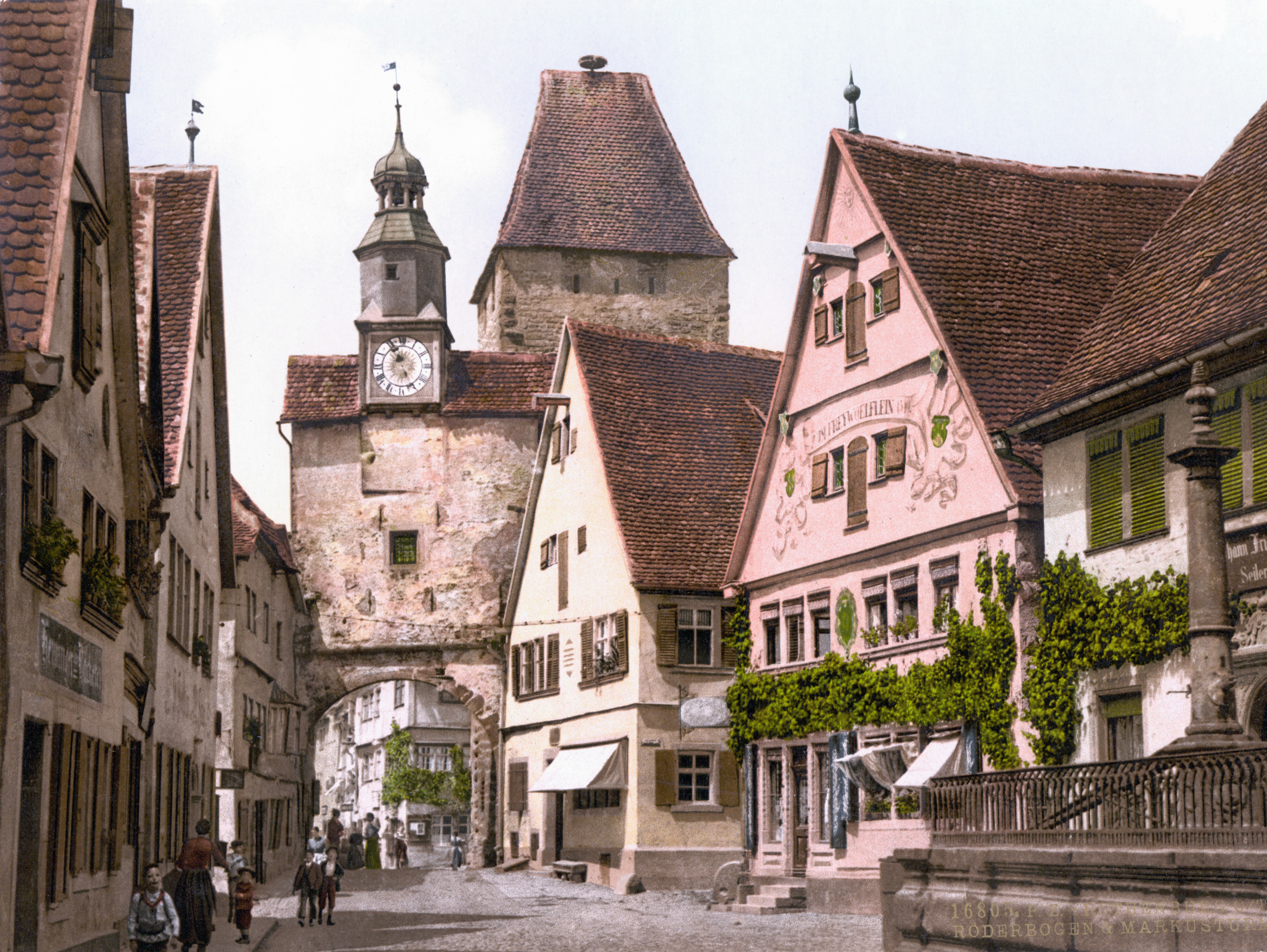 Roderbogen Markustor Rothenburg um 1900